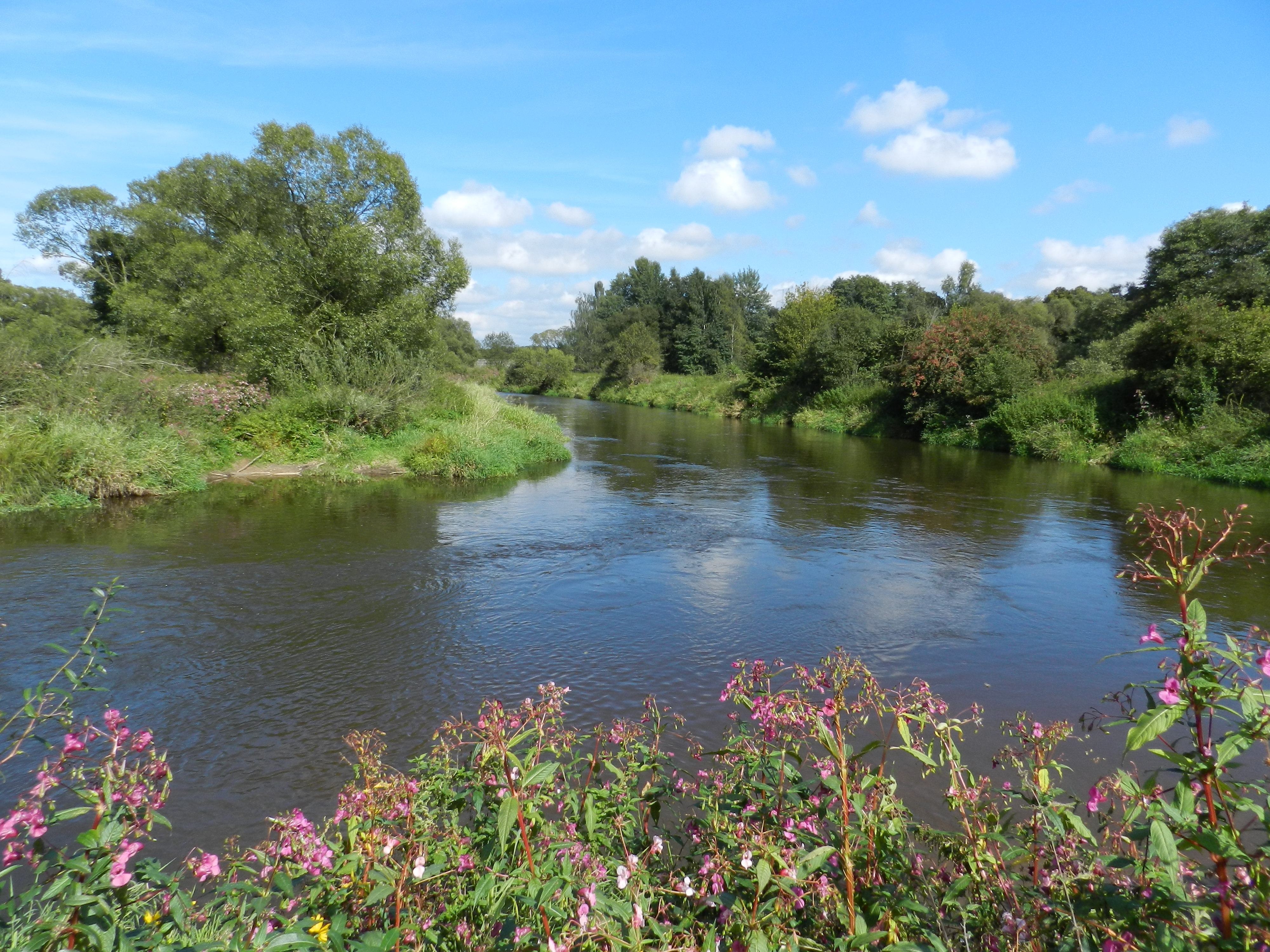 Die Haidenaab (links) vereint sich mit der Waldnaab (von oben kommend) bei Unterwildenau zur Naab.